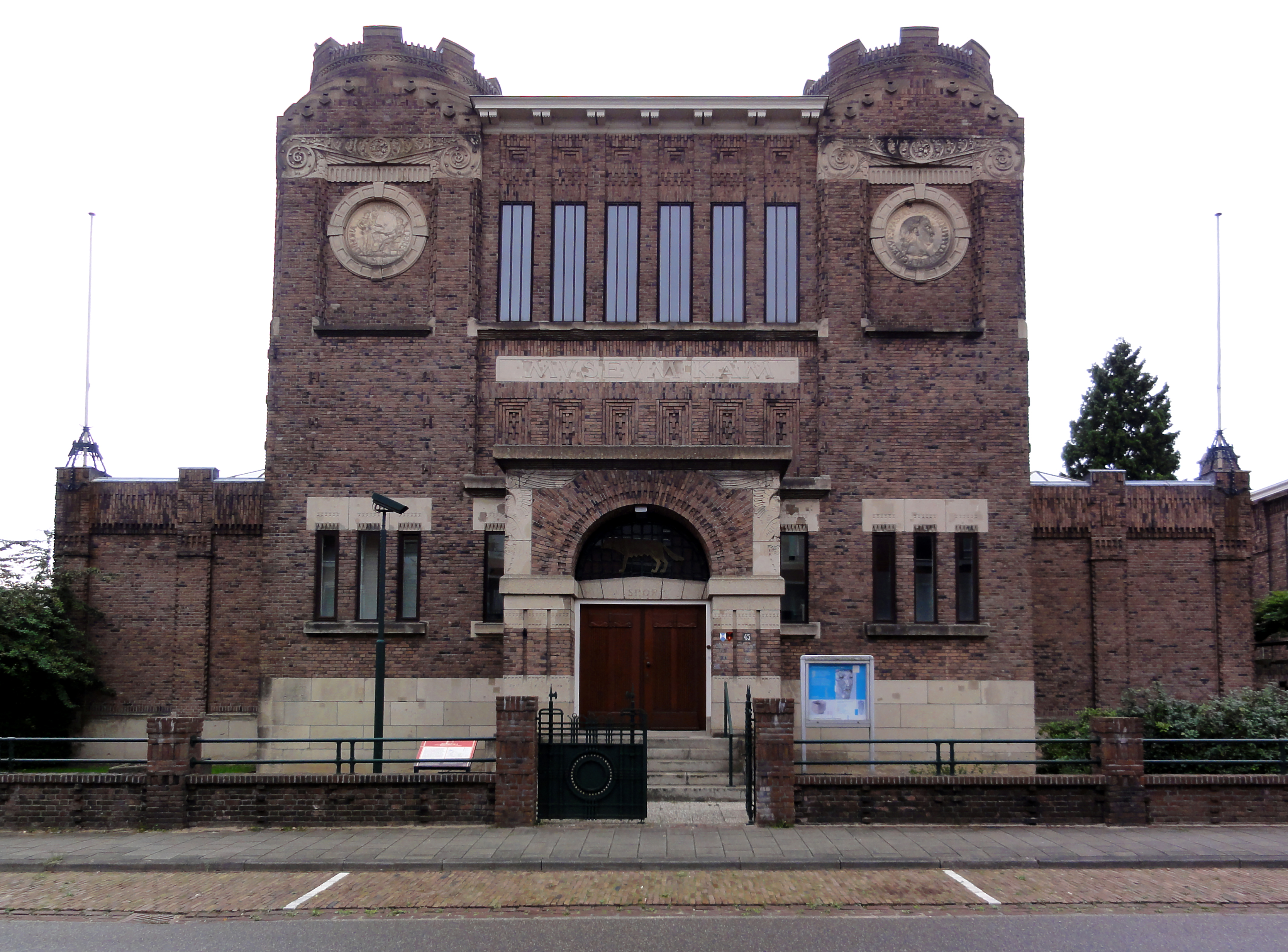 Nijmegen Rijksmonument 522950 Museum Kam vooraanzicht